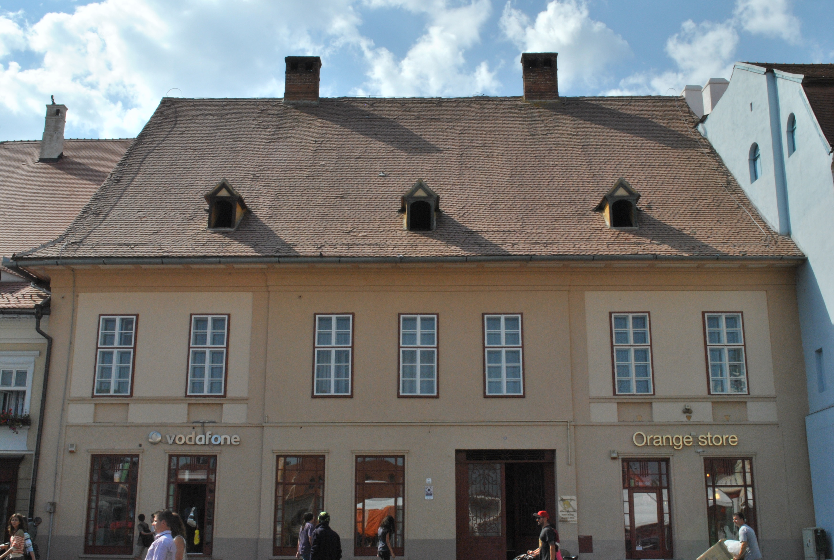 Casă, sec. XVIII - XIX, cu vestigii sec. XIV - XV